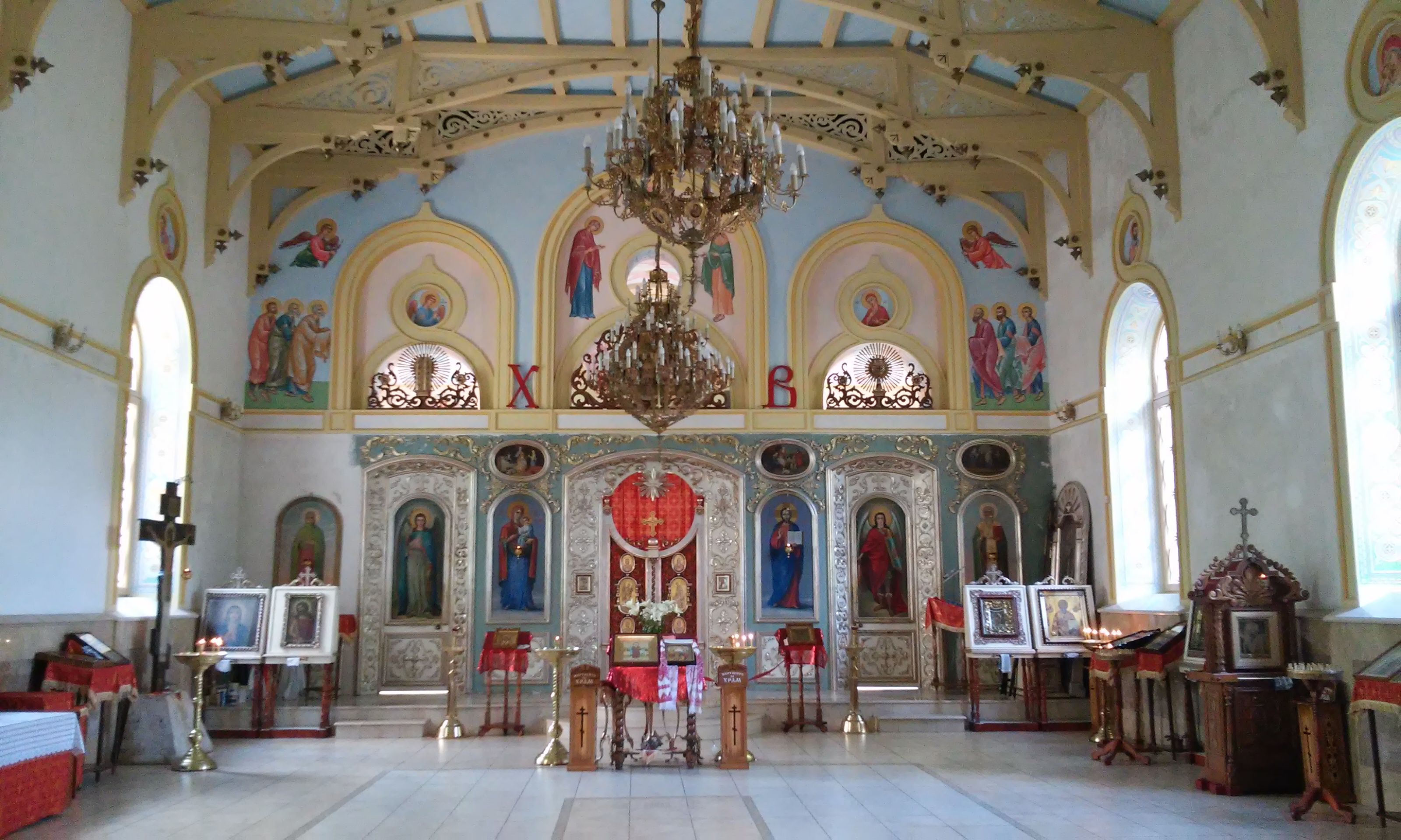 Wnętrze cerkwi św. św. Grzegorza i Zoe w Odessie